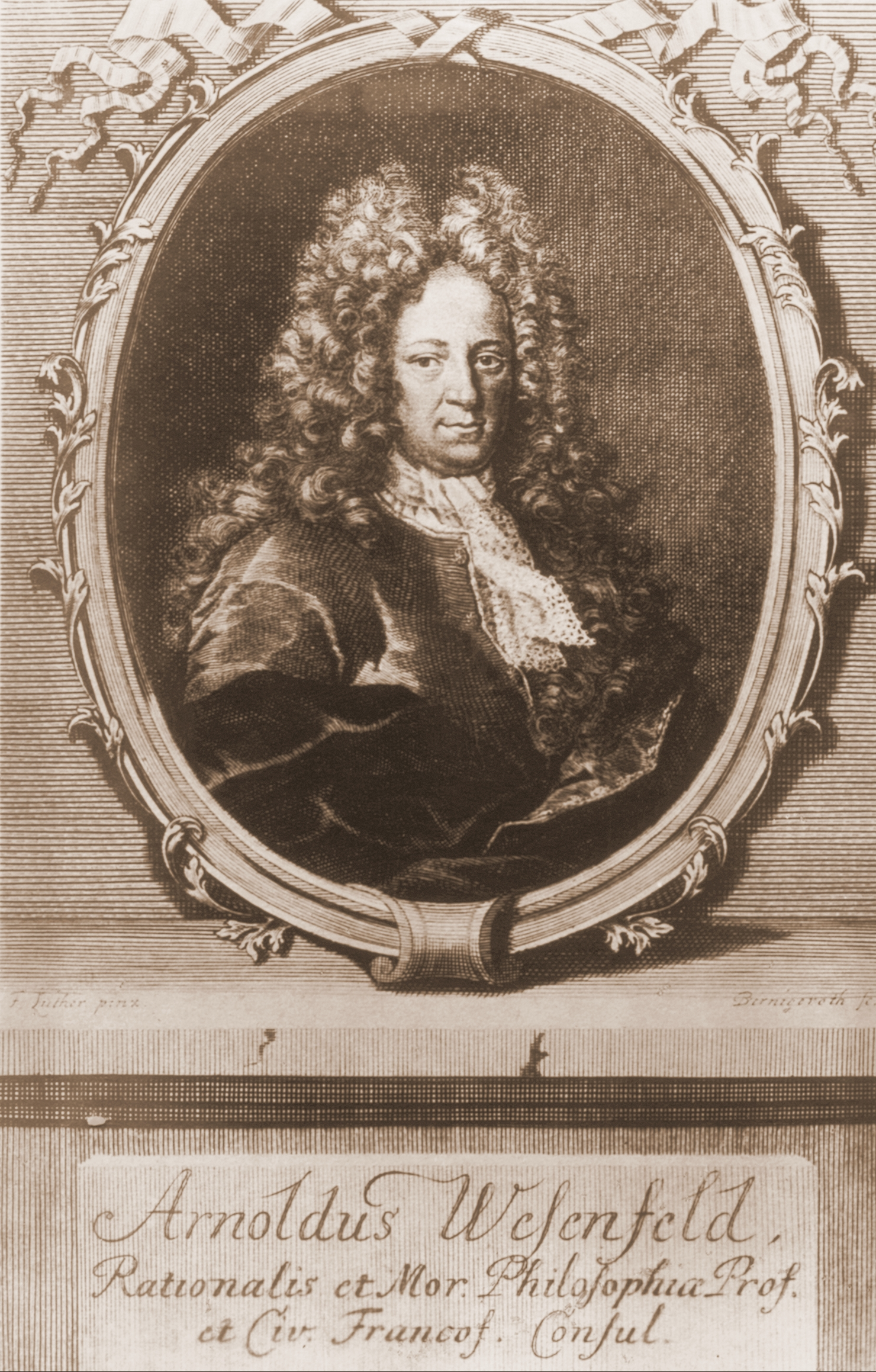 Faksimilé eines Kupferstich-Portraits des Arnold Wesenfeld, Hersteller: Bernigeroth (Zeichner), Beschriftung: F.Luther prinx. (gedr.), Bernigeroth (gedr.), Arnoldus Wesenfeld - Rationalis et Mor. Prof. - et Civ. Francof. Consul., Original-Platte/Bild: 27 x 17,5